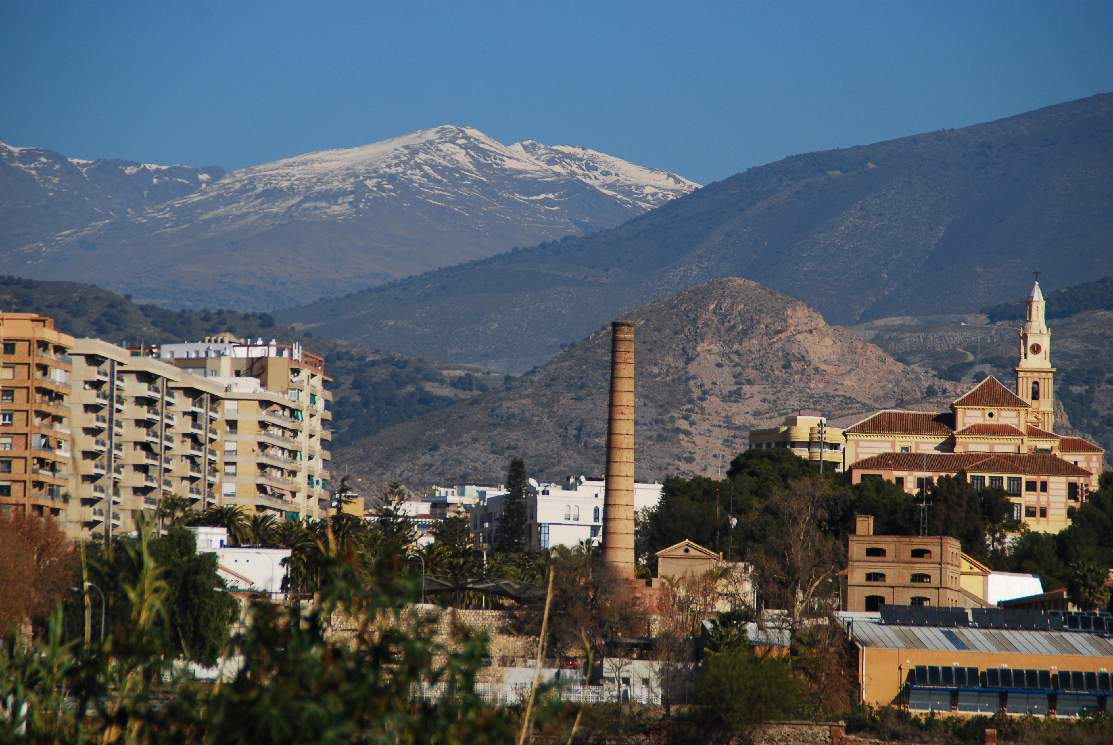 Motril, en la Costa y a apenas una hora de Sierra Nevada.